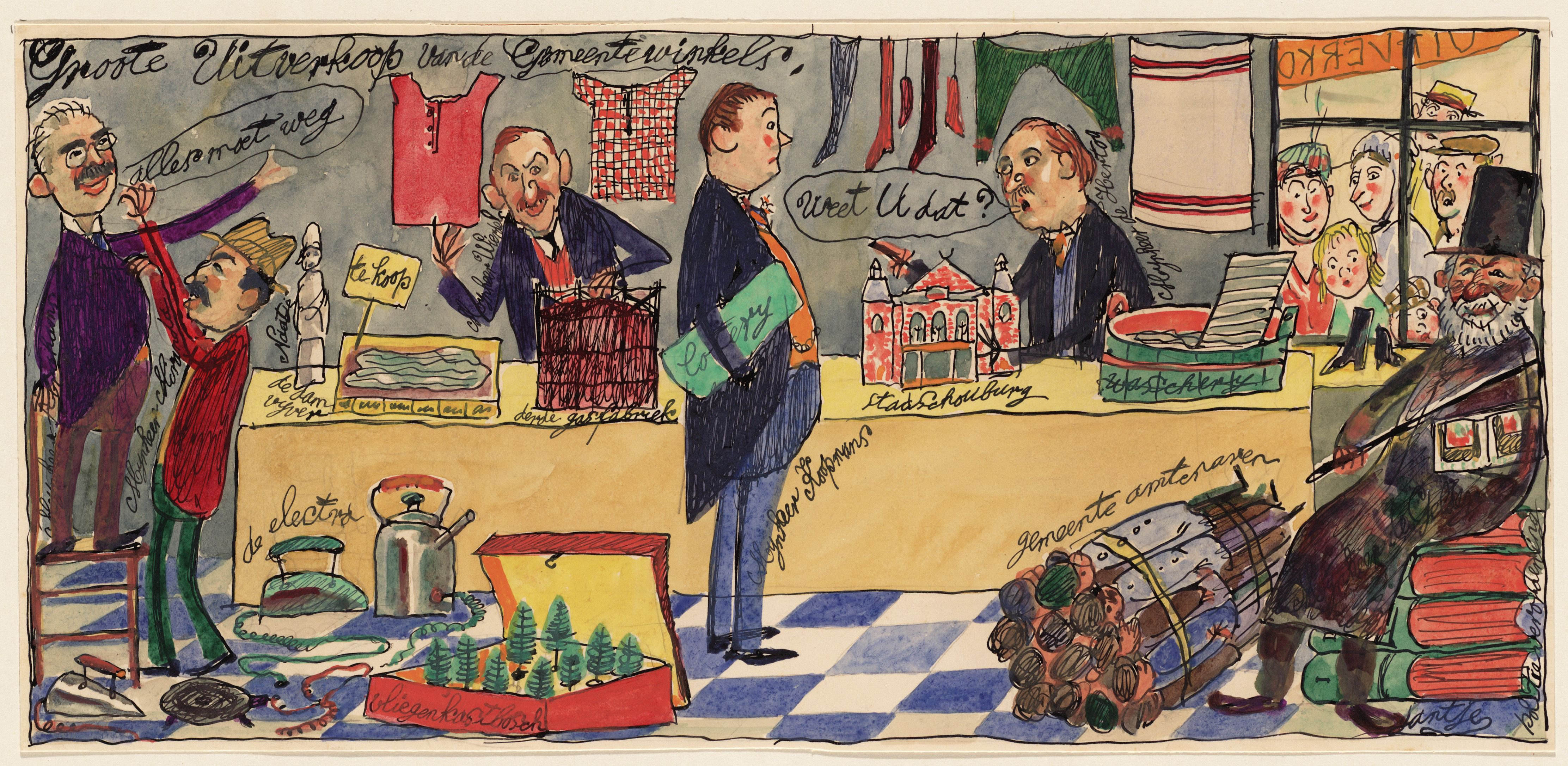 Karikatur des niederländischen Zeichners Felix (1878-1943) zur Schließung von "Gemeentewinkels" (Gemeindeläden) in den Niederlanden